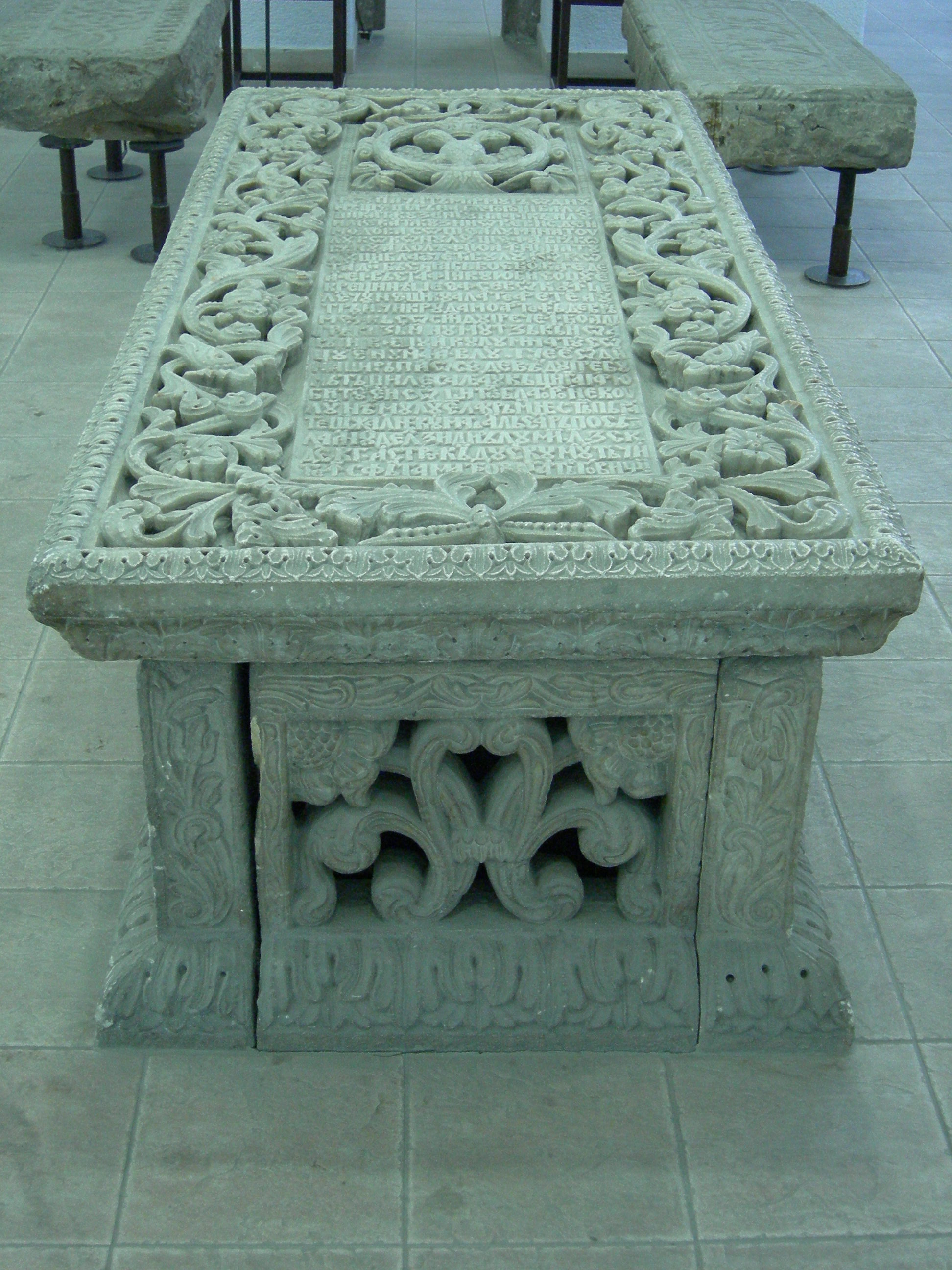 Sarcophagus of Bălaşa Cantacuzino, Târgovişte, Dâmboviţa County, 1711. Museum of Romanian History in Bucharest, Romania.